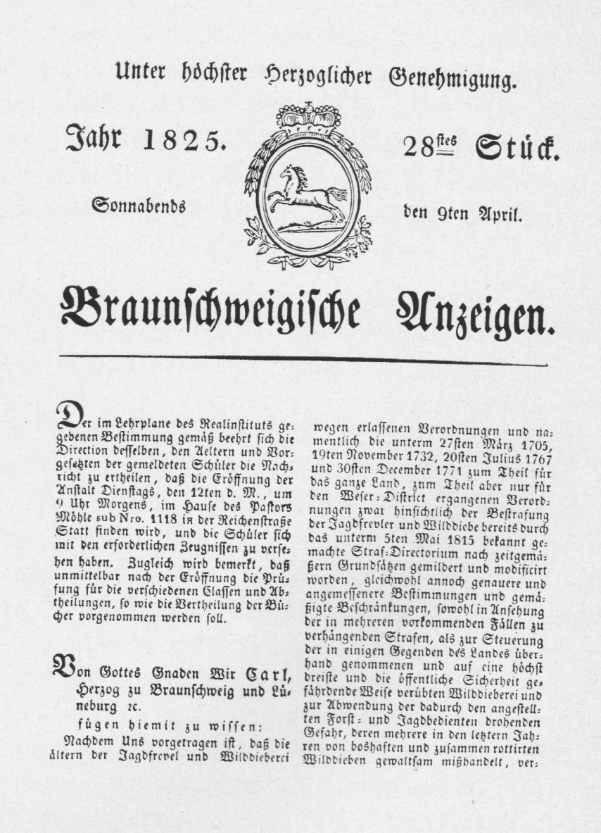 Titelblatt Braunschweigische Anzeigen vom 9. April 1825, die Eröffnung des Realinsitituts ankündigend